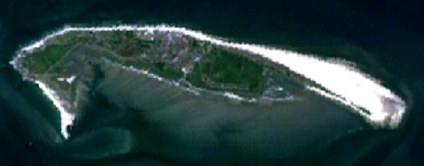 Satellitenbild der Insel Wangerooge